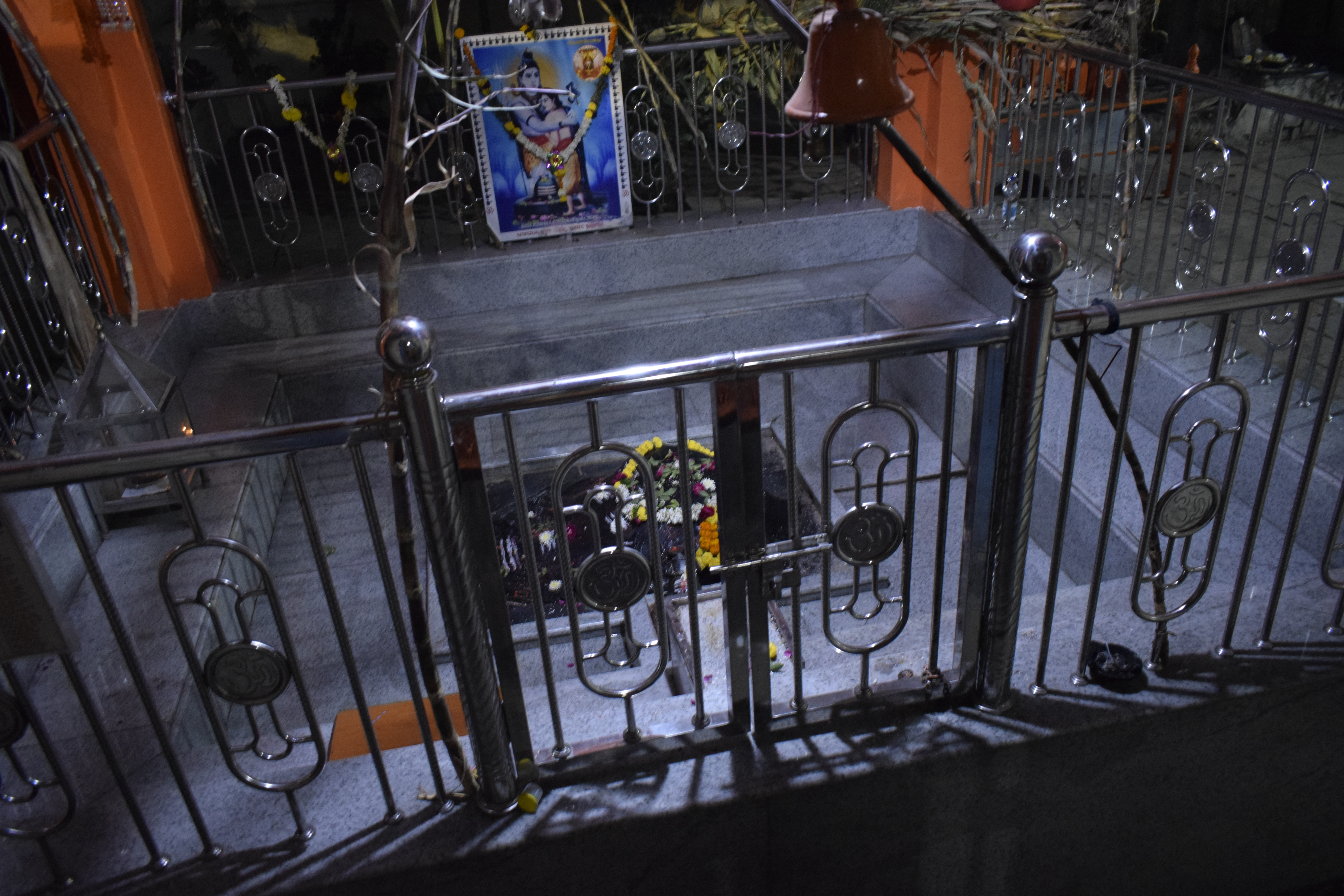 श्री नवणेश्वर लिंग